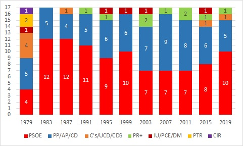 Reparto de los concejales por partidos políticos